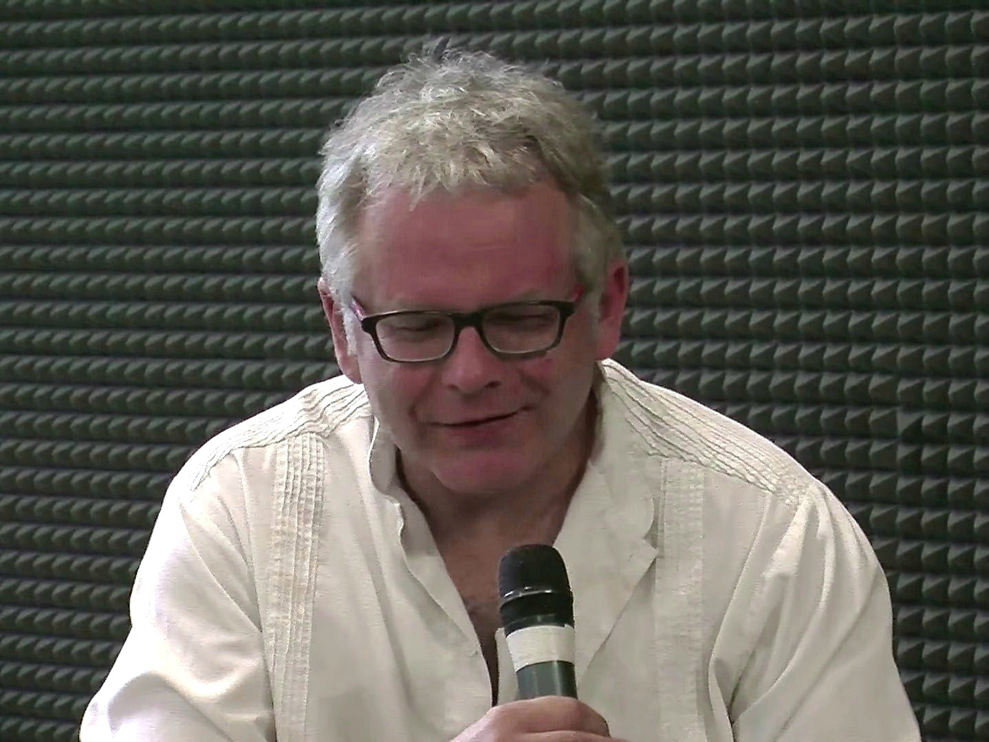 Artur Domosławski, dziennikarz i pisarz.